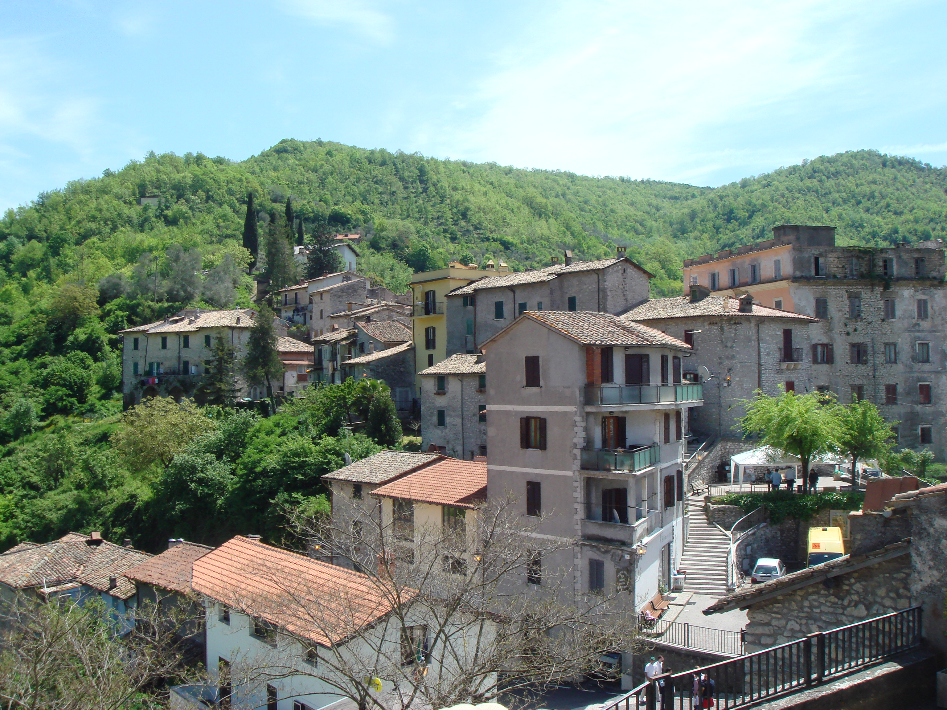 Vista del pueblo de Percile, Lazio, Italia